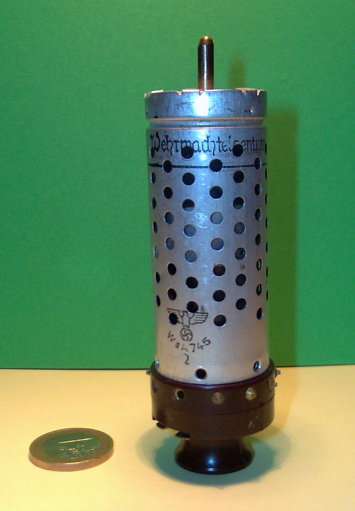 Pentodo alemán RV12P4000, de la Segunda Guerra Mundial